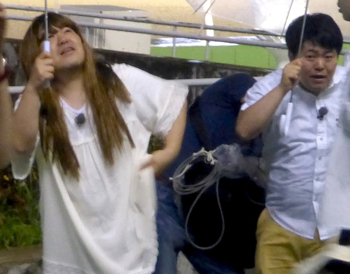 ザ・たっちは、双子の兄弟によるお笑いコンビ。たくや、かずや。(Za Tacchi, Japanese comedians)